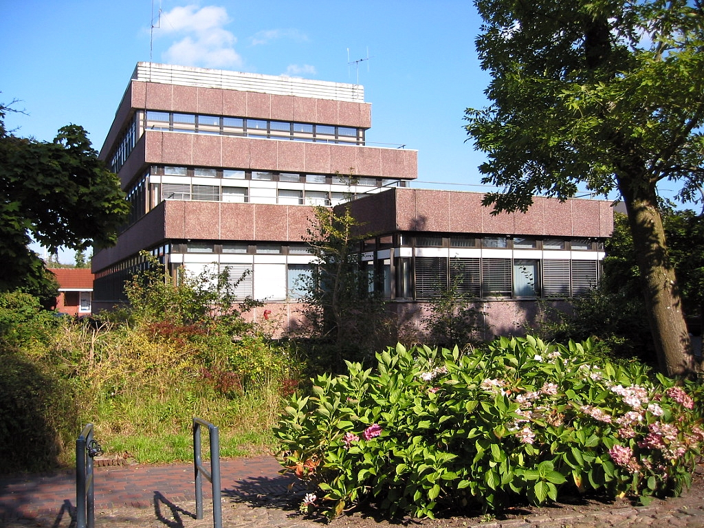 ehemaliges Glücksburger Rathaus, im Januar 2011 abgerissen